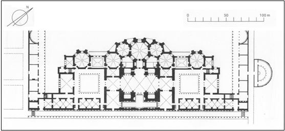 Carthage, thermes d'Antonin, plan du rez de chaussée, J. Vérité, 2017.